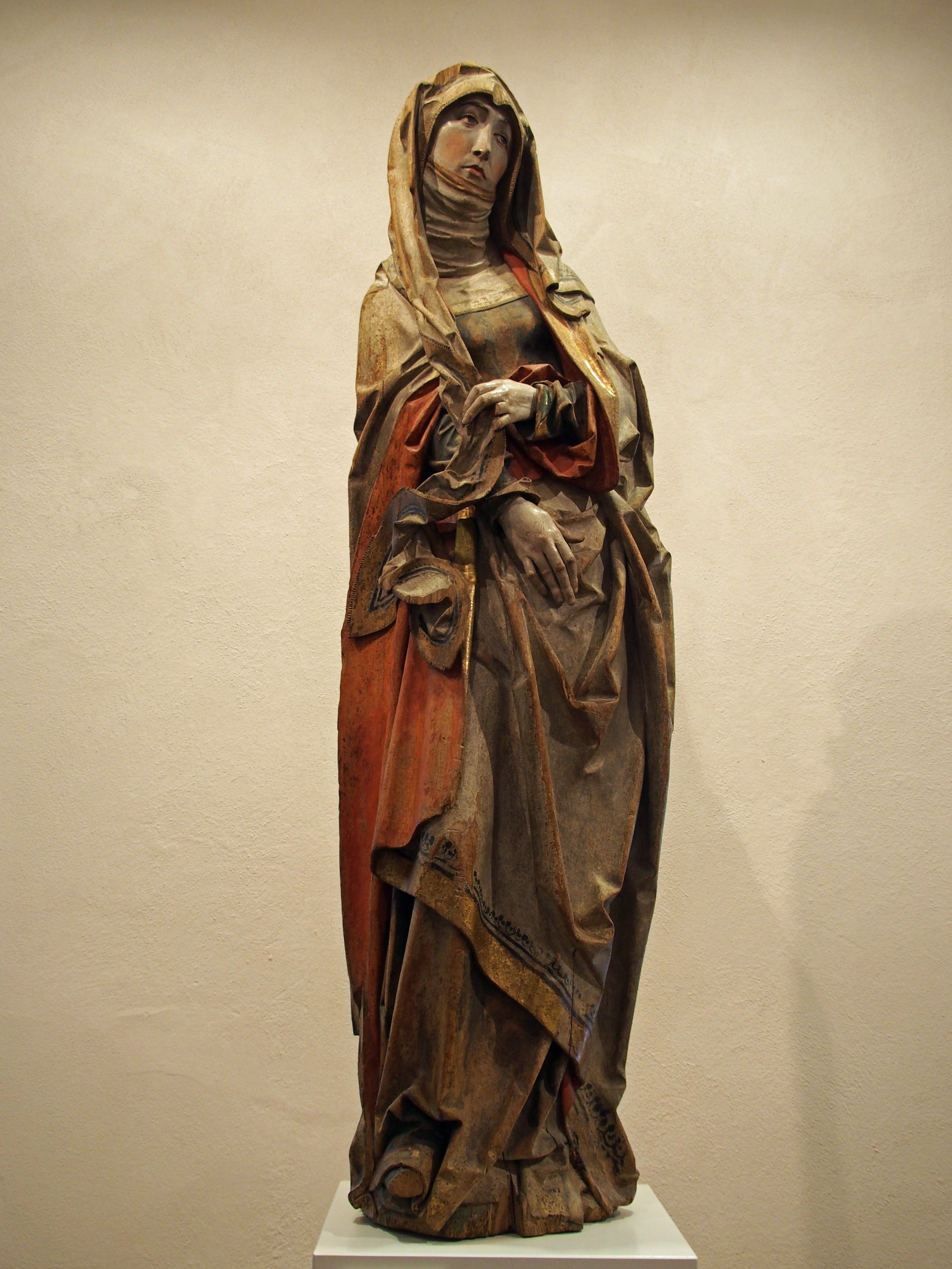 Trauernde Maria. Früherer Standort: Acholshausen